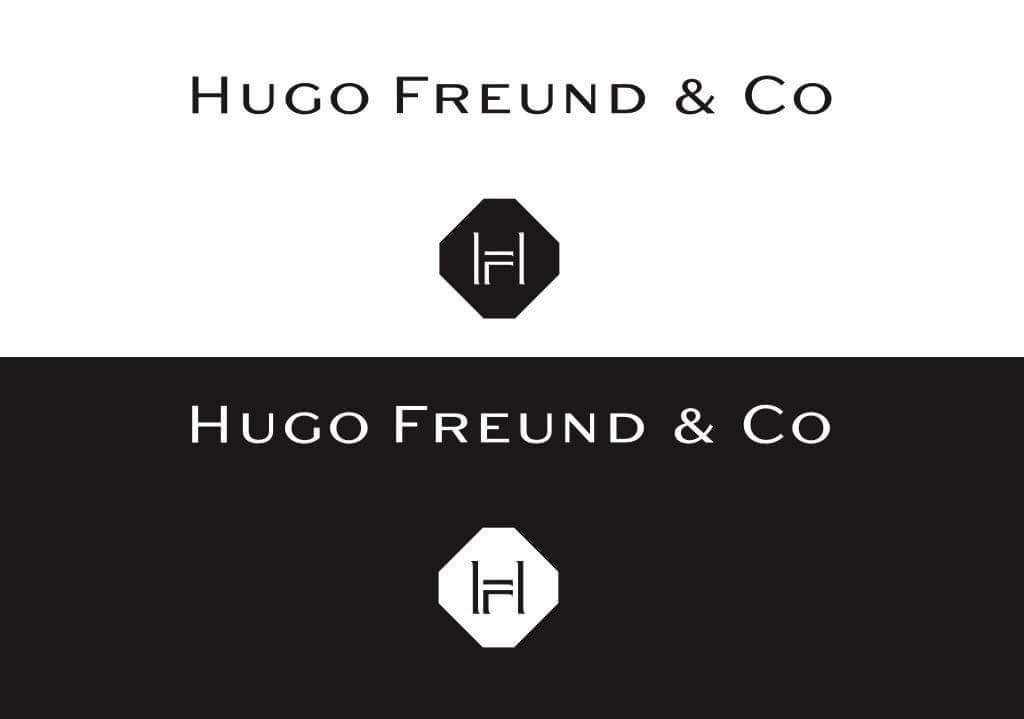 Hugo Freund a Spol. 1908